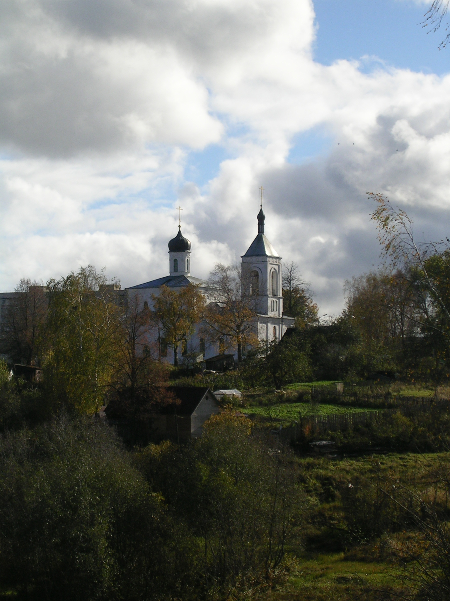 Saint Vladimir temple in Safonovo